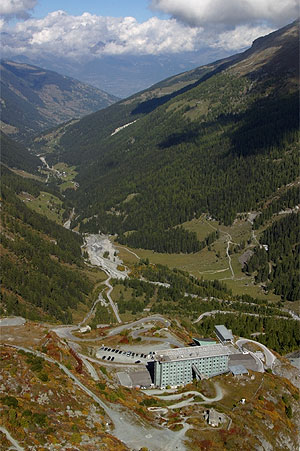 Hotel unterhalb der Staumauer (Grande Dixence)